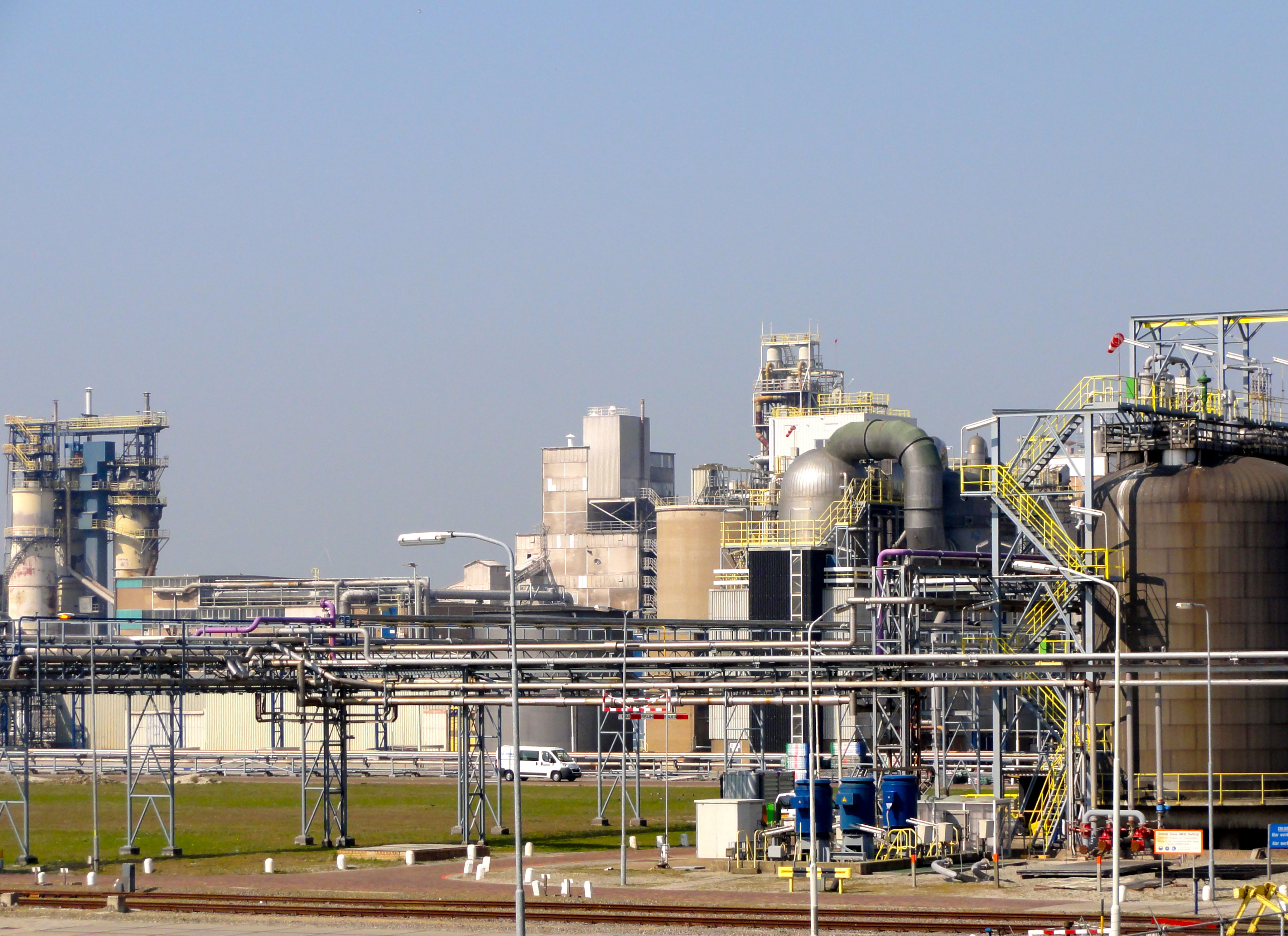 Chemie Park Delfzijl